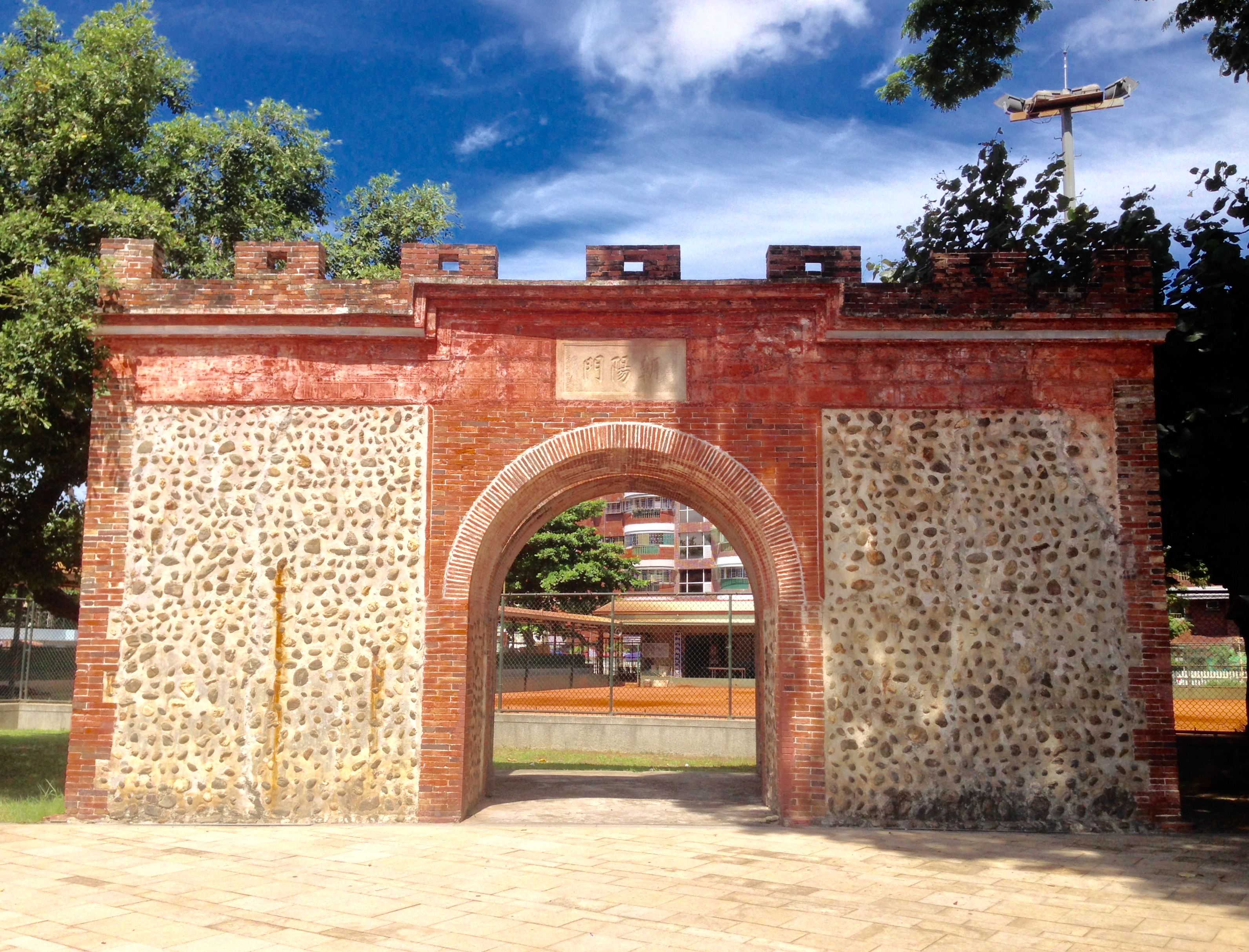 中文（台灣）: 朝陽門（阿猴城門）